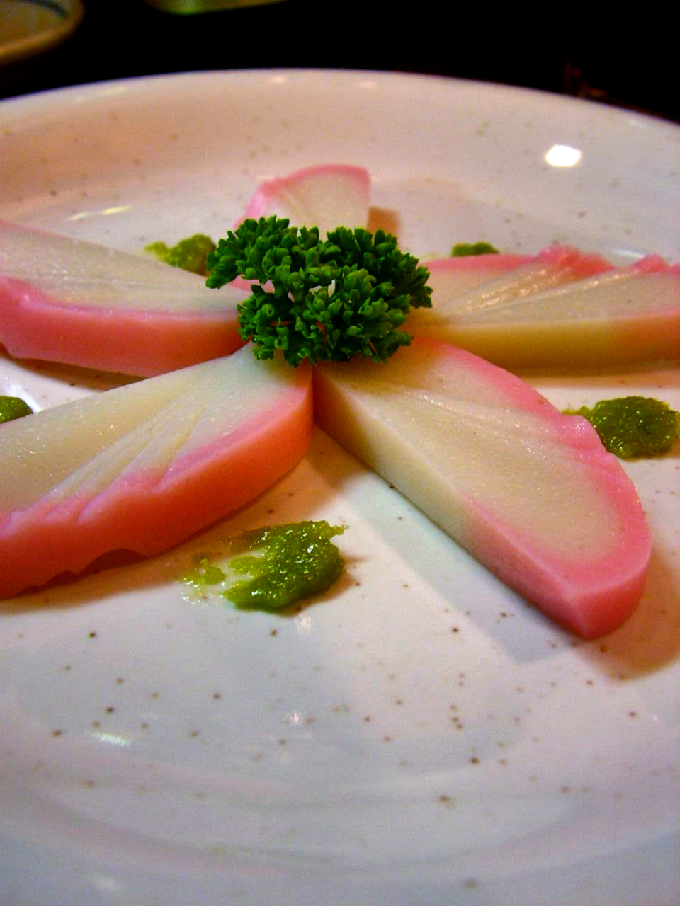 板わさ＝蒲鉾（東京・中央区築地1-12-22 コンワビル地下1F、築地駅・東銀座駅最寄りの豚カツ屋「築地 とんき」）